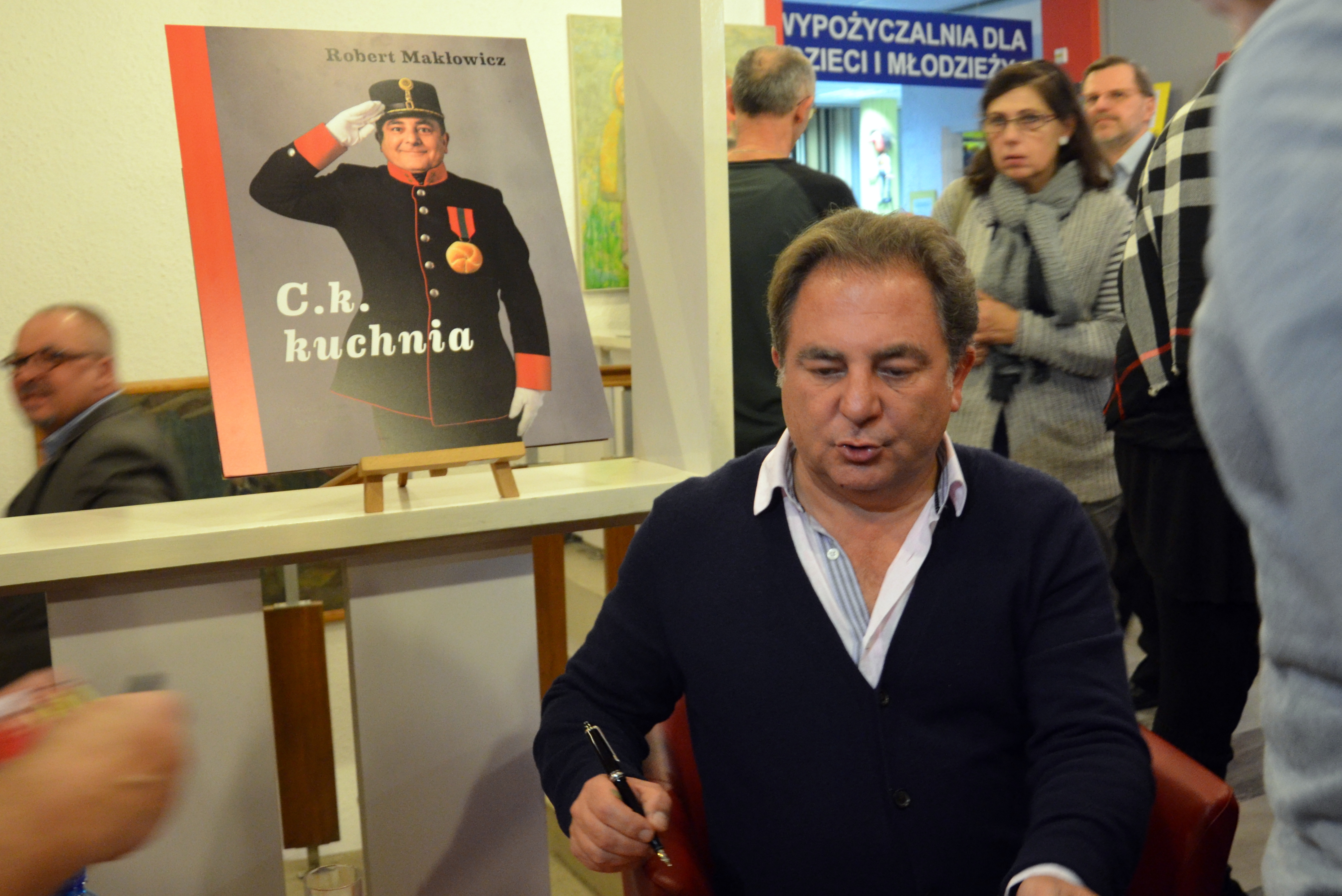 Die K.u.K. Küche - Das Kochbuch von Robert Maklowicz